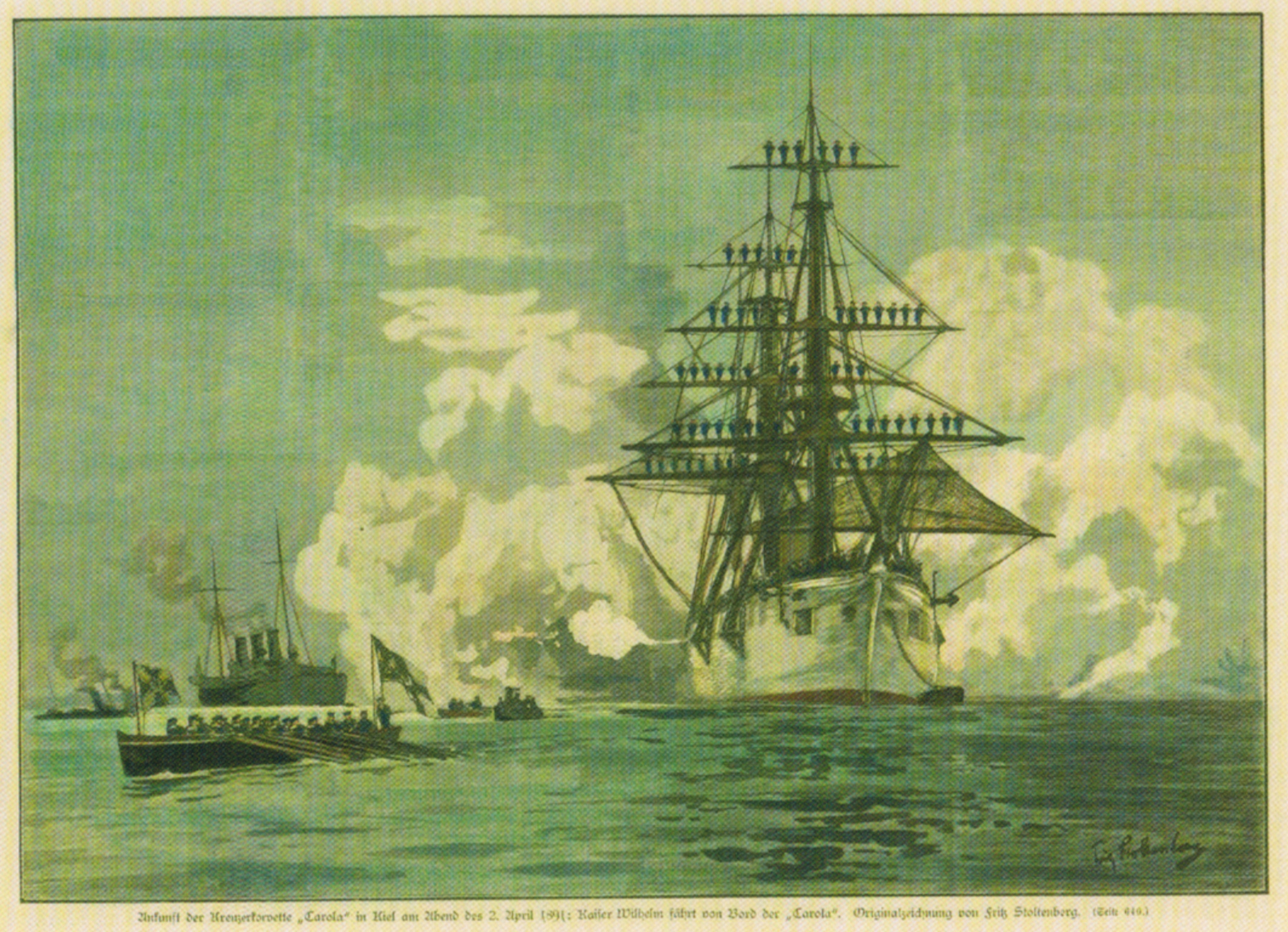 Die Kreuzerkorvette Carola in Kiel am 2. April 1891, Holzstich und Zeitschiftenillustration von Fritz Stoltenberg